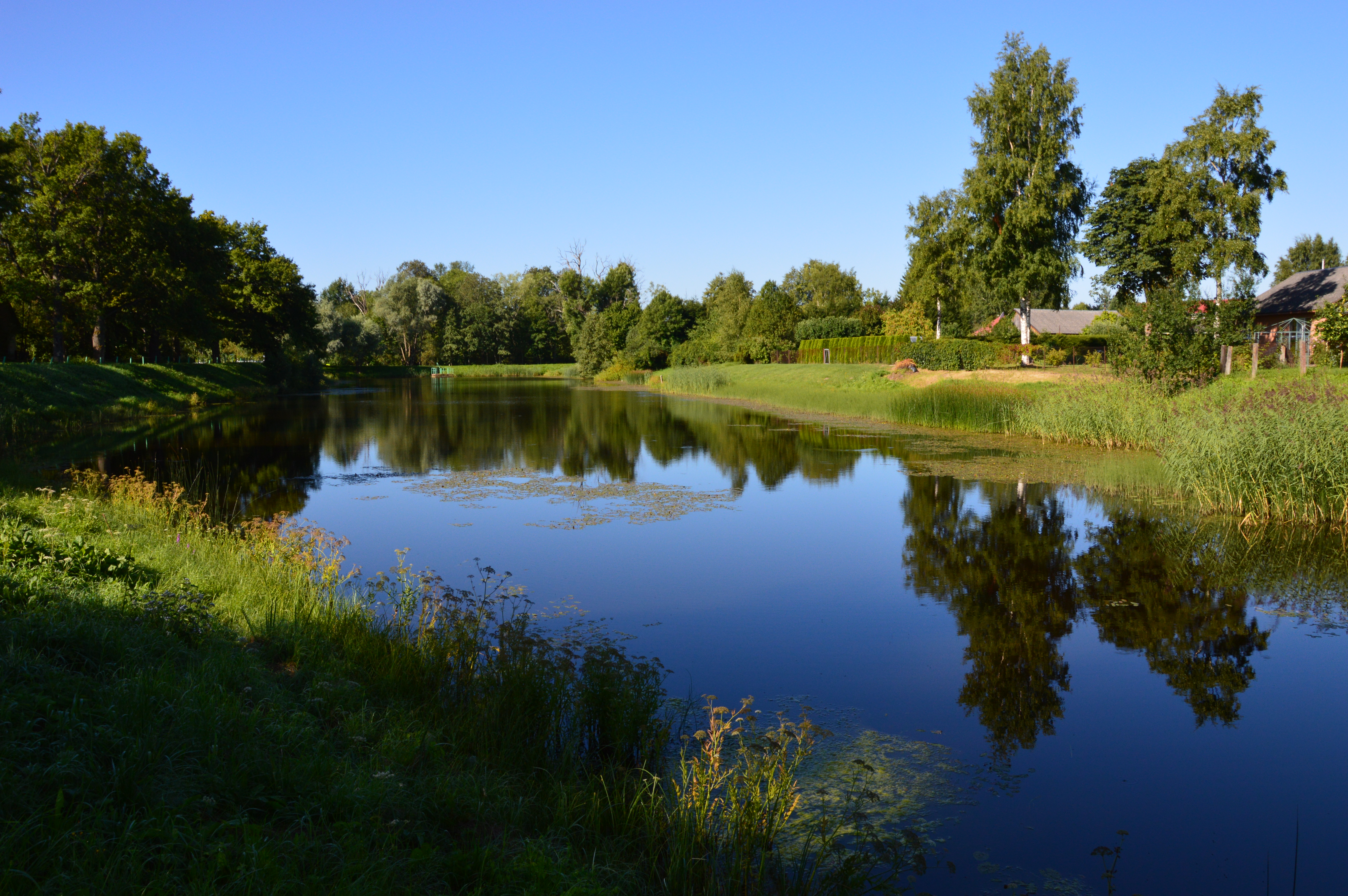 Kivi-Vigala paisjärv.